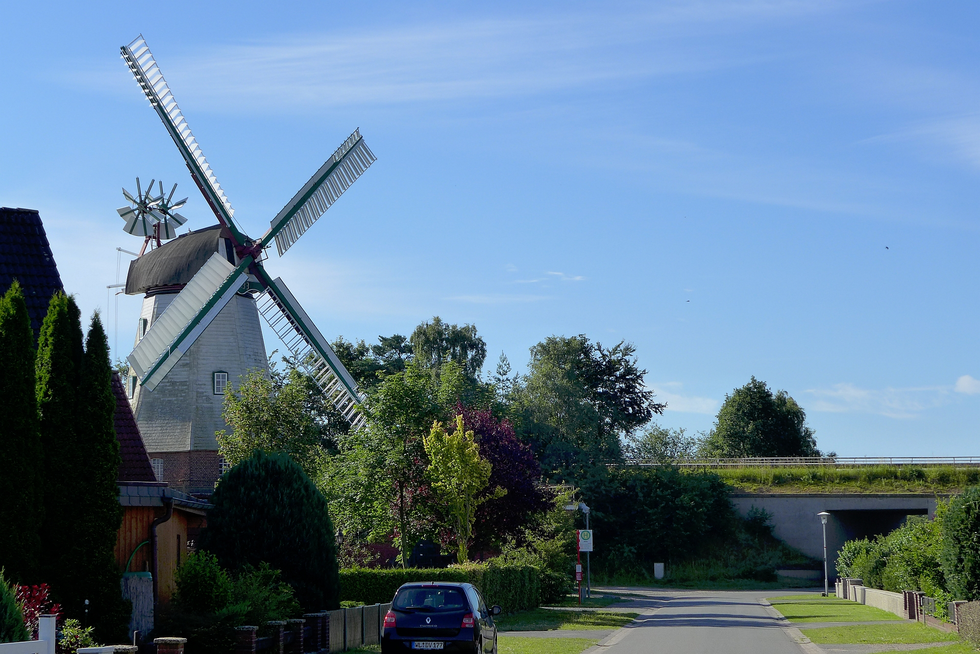 Holländermühle mit Ursprung im Jahre 1833 in Artlenburg, Landkreis Lüneburg. Mahlbetrieb bis 1995, nunmehr Betreuung durch den Verein Artlenburger Mühlenfreunde.